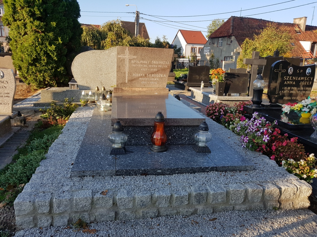 Apolinary Skrodzki, grób, cmentarz przy ul. Morskiej w Braniewie, 2018